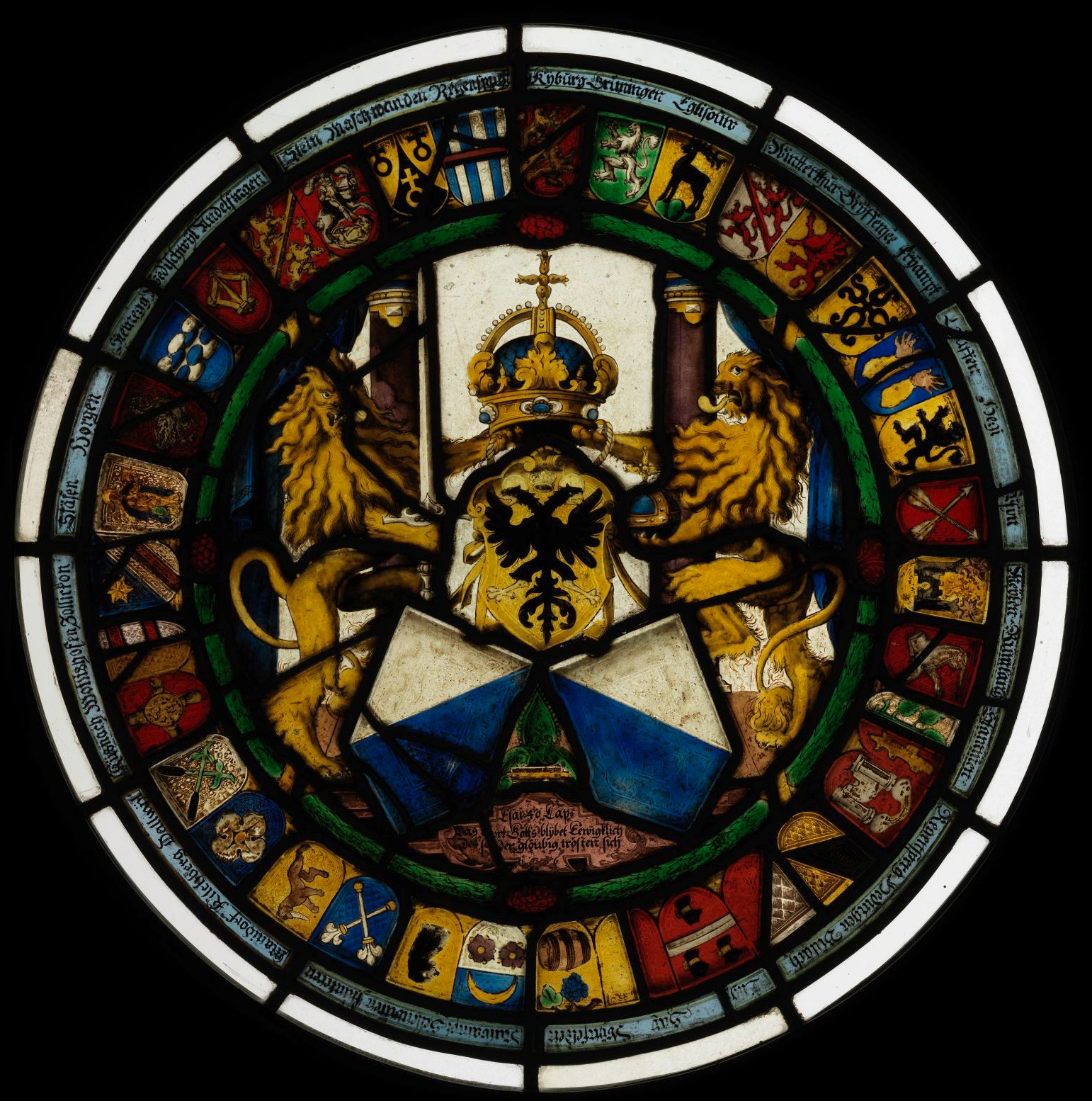 Ämterscheibe der Stadt Zürich mit 35 Wappen der Ämter und Gemeinden (Germanisches Nationalmuseum MM916), Hans Jakob Nüscheler dem Älteren (1583-1654) zugeschrieben. Durchmesser: 52,3 cm (mit Holzrahmen 57 cm). Inschrift: Esai 40 Cap. / Das wort Gotts blybet Eewigklich / Des soll der glöubig trösten sich / 1616 — Kyburg, Grüningen, Eglisouw, Wintterthur, Gryffensee, Fryampt, Lauffen, Hegi, Pfyn, Meylen, Rümlang, Stammen, Regensperg, Hedingen, Bülch, Ellg, Sax, Wynfelden, Nuwampt, Sellenbüren, Flunteren, Manidorf, Kilchberg, Dallwyl, Küsnacht, Wollishofen, Zollikon, Stäfen, Horgen, [?Newegg?], Wedischwyl, Andelfingen, Stein, Maschwanden, Regenspurg (zu "?Newegg": "im Neuegg" war das Haus der Familie Nüscheler in der Stadt Zürich) Literatur: Bremen, Walther: Die alten Glasgemälde und Hohlgläser der Sammlung Bremen in Krefeld. Köln--Graz 1964, Nr. 47 Daniel Hess und Dagmar Hirschfelder (Hrsg.), Renaissance. Barock. Aufklärung. Kunst und Kultur vom 16. bis zum 18. Jahrhundert, Die Schausammlungen des Germanischen Nationalmuseums, Band 3, Nürnberg 2010, S. 180, 397, Abb. 142.